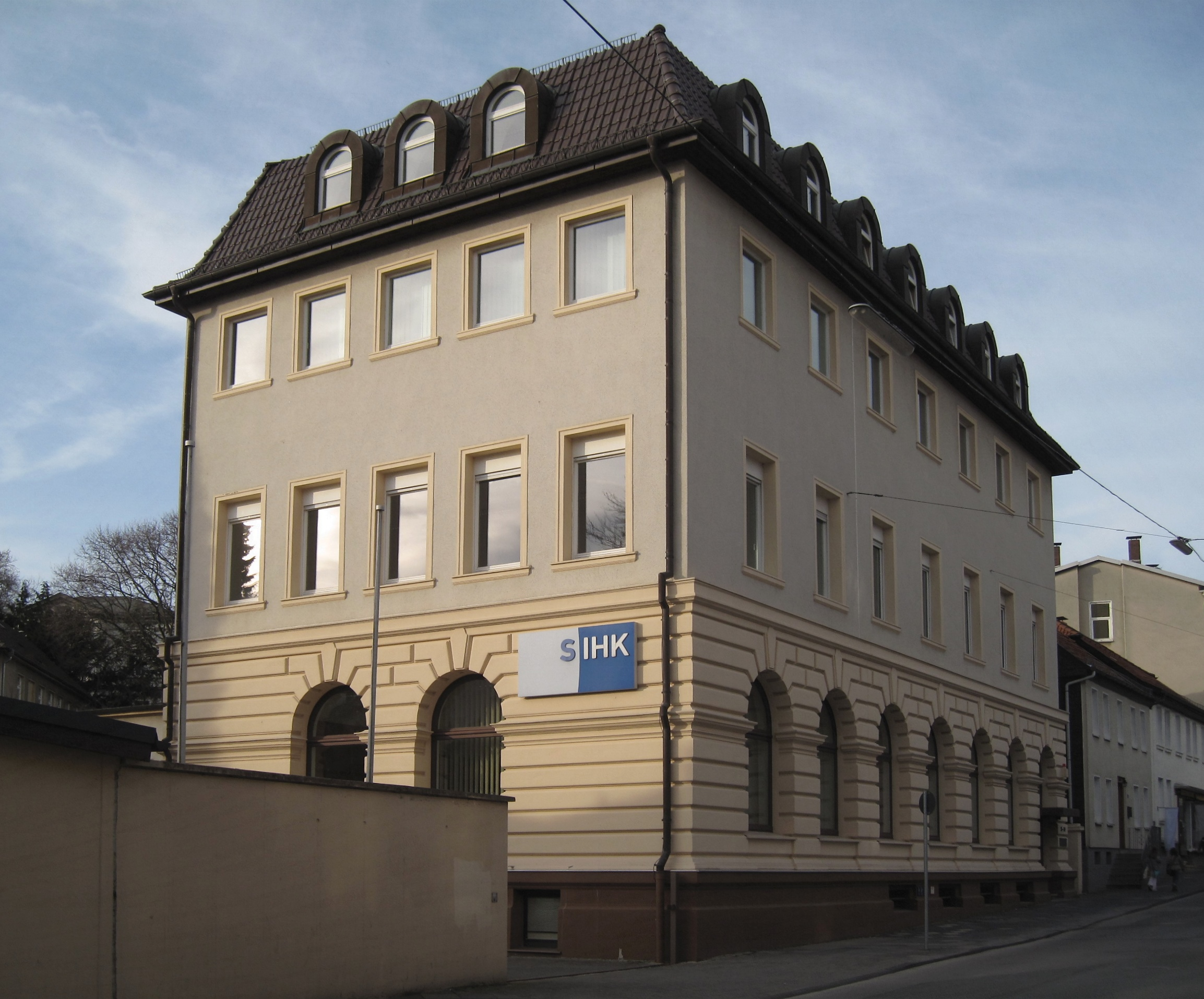 Südwestfälische Industrie- und Handelskammer zu Hagen, Geschäftsstelle Iserlohn, Gartenstraße 15-19 in Iserlohn.